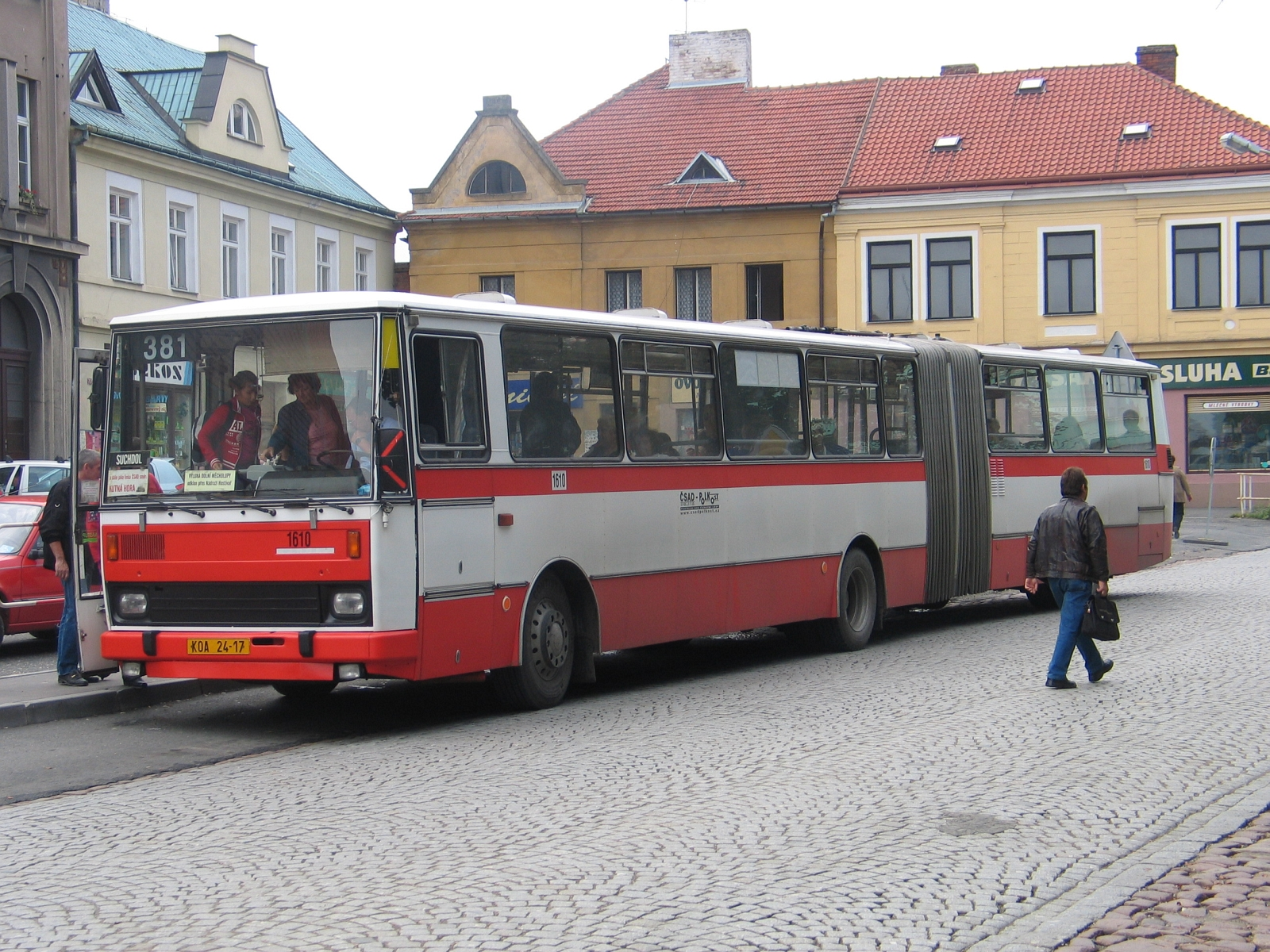 Karosa B741, ČSAD Polkost